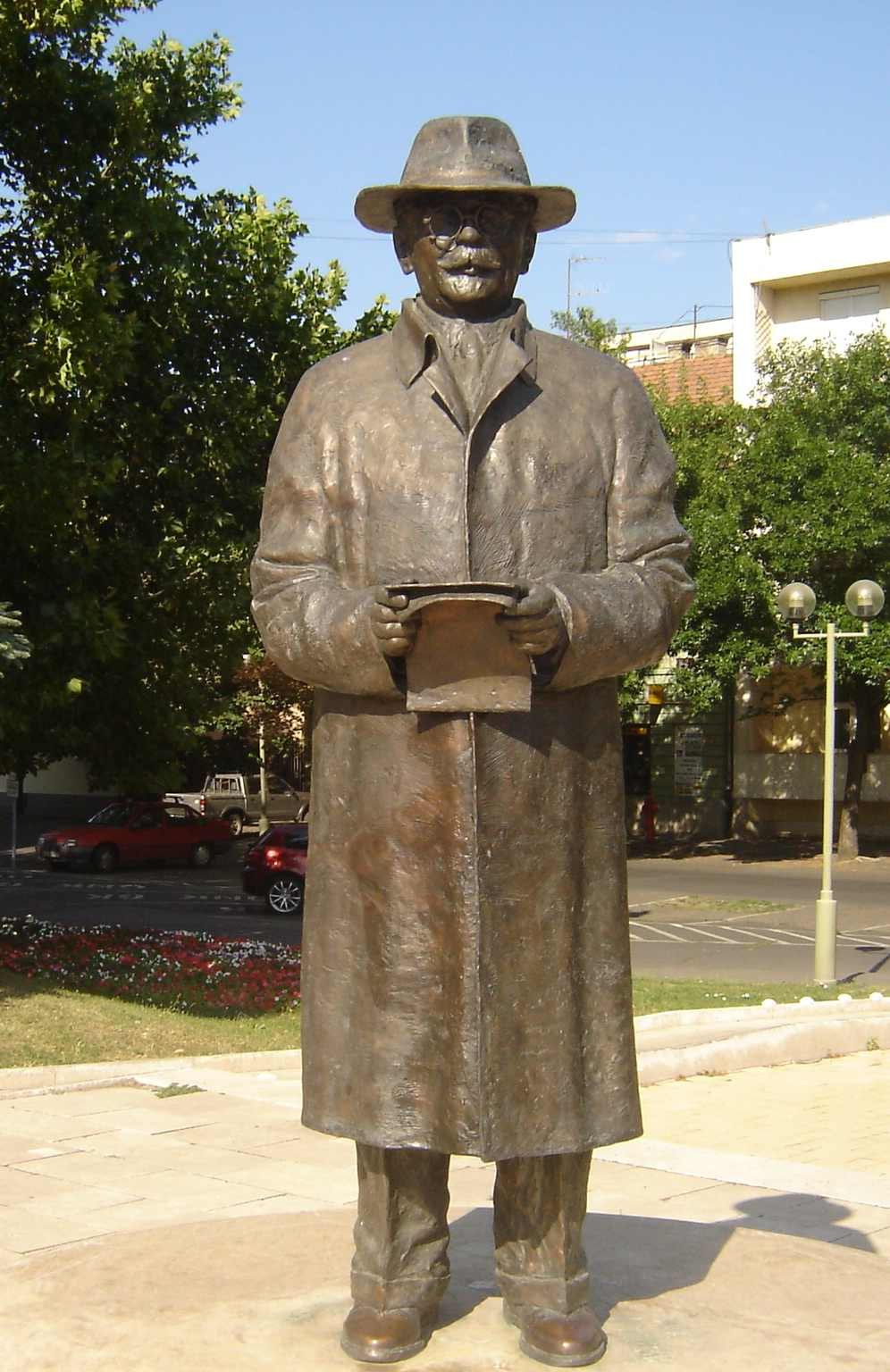 Szeged Nagy Imre mártírminiszterelnök szobra. Lapis András szobrászművész alkotása hu:2003-ban . Újfalusi Németh Jenő felvétele 2007 júliusában